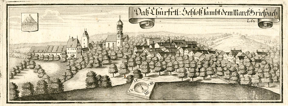 “Daß Churfrtl: Schloß sambt dem Marck Griesbach” (Bad Griesbach im Rottal), aus: Beschreibung des Churfürsten- u. Hertzogthumbs Ober- und Nidern Bayrn. Rentamt Landshut. – Gericht Griesbach, 2. Auflage 1750 (1. Auflage erschien 1723)